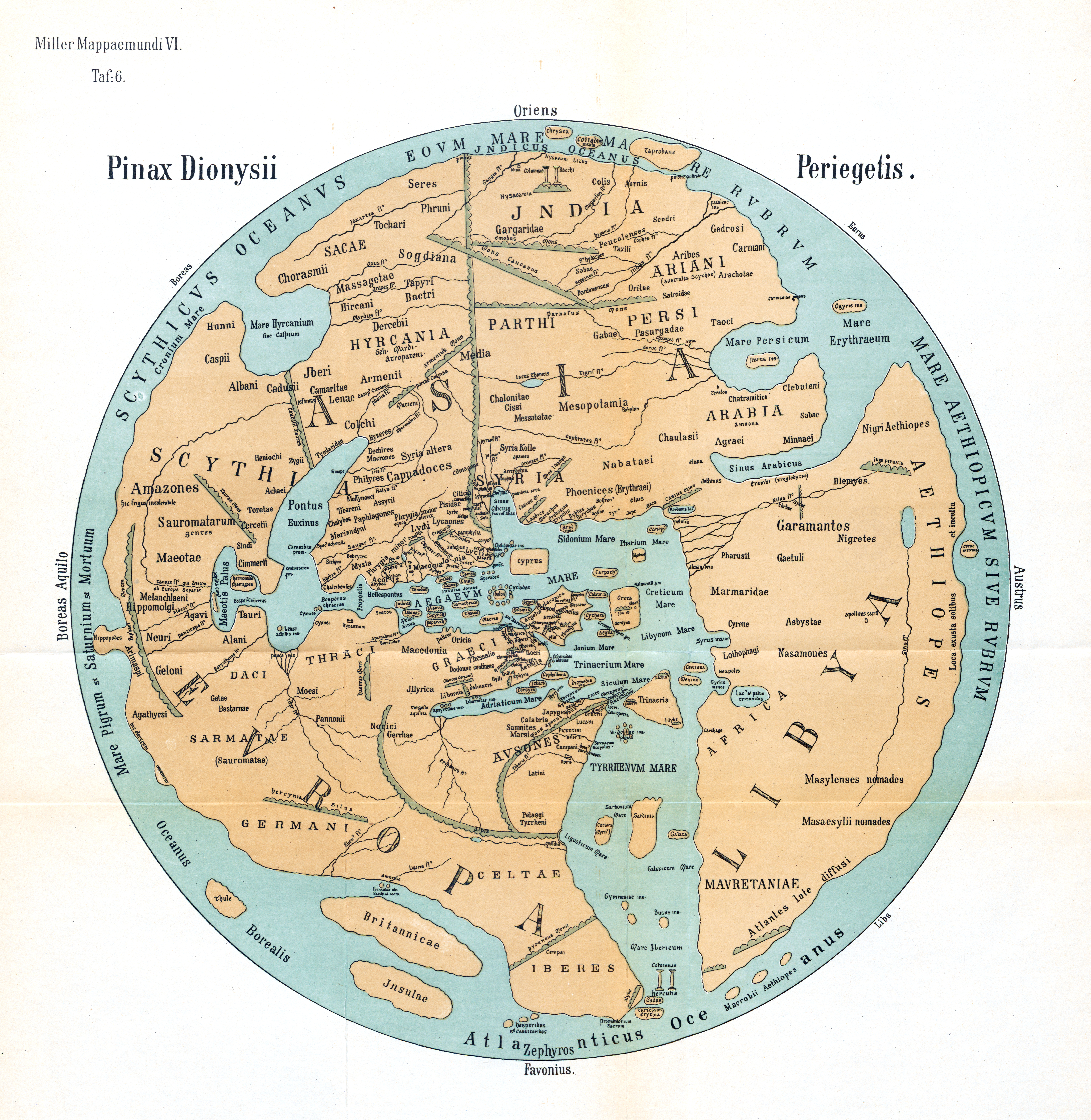 Weltkarte des Dionysios Periegetis